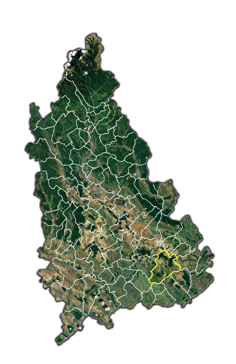 Racari jud Dambovita.